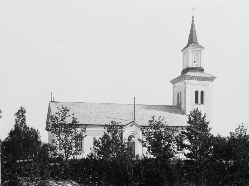 Kyrkan mot söder.